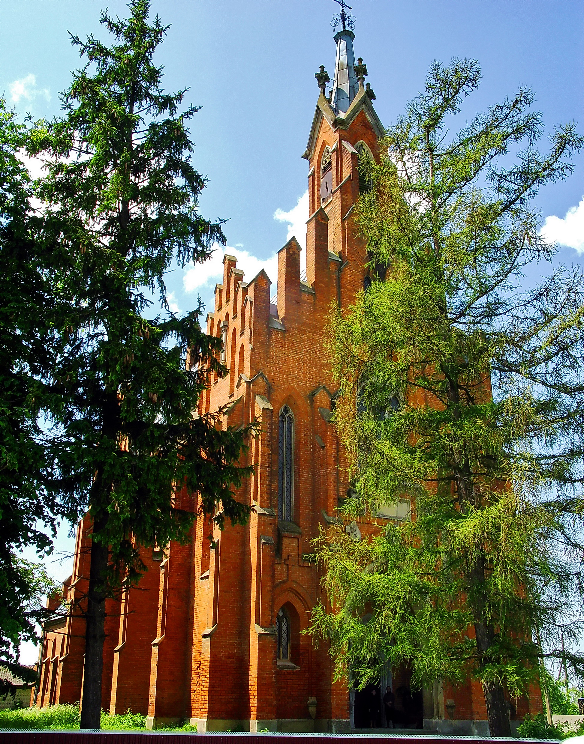 Костел Св. Анни (1875 р.) (мур.), Озеряни